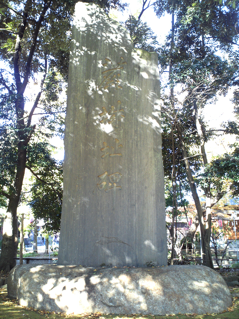 蕨城本丸跡